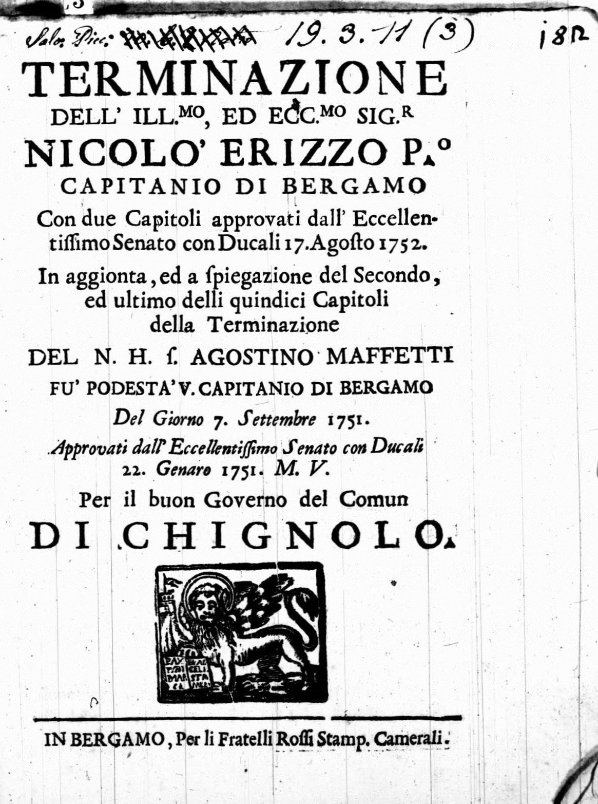 Frontespizio